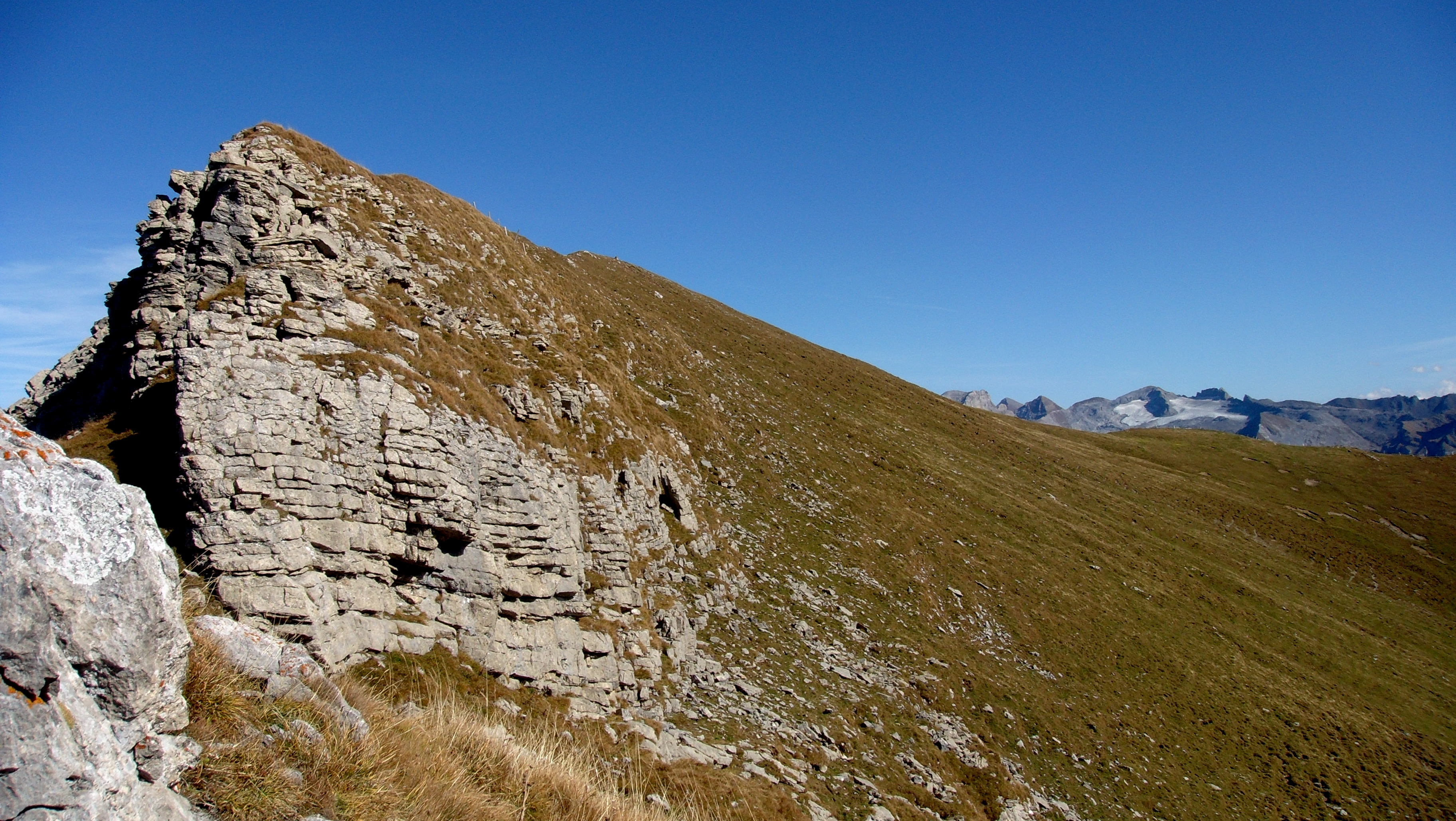 Der Grat des Widderfeldstocks im Kanton Obwalden (Schweiz).